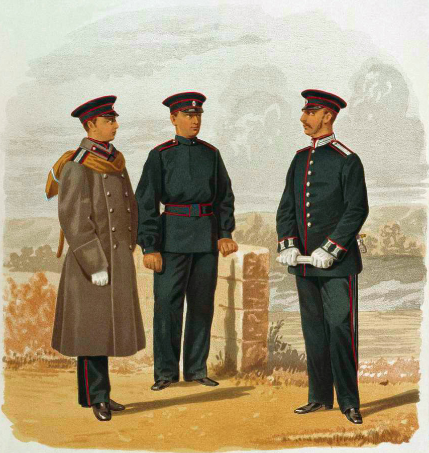 Императорская Военно-Медицинская Академия и Военно-Фельдшерские школы. Студенты Медицинской Академии ( парадная и обыкновенная форма ) и Воспитанник Военно-Фельдшерской школы. ( прик. по воен. вед. 1881 г. № 194 )